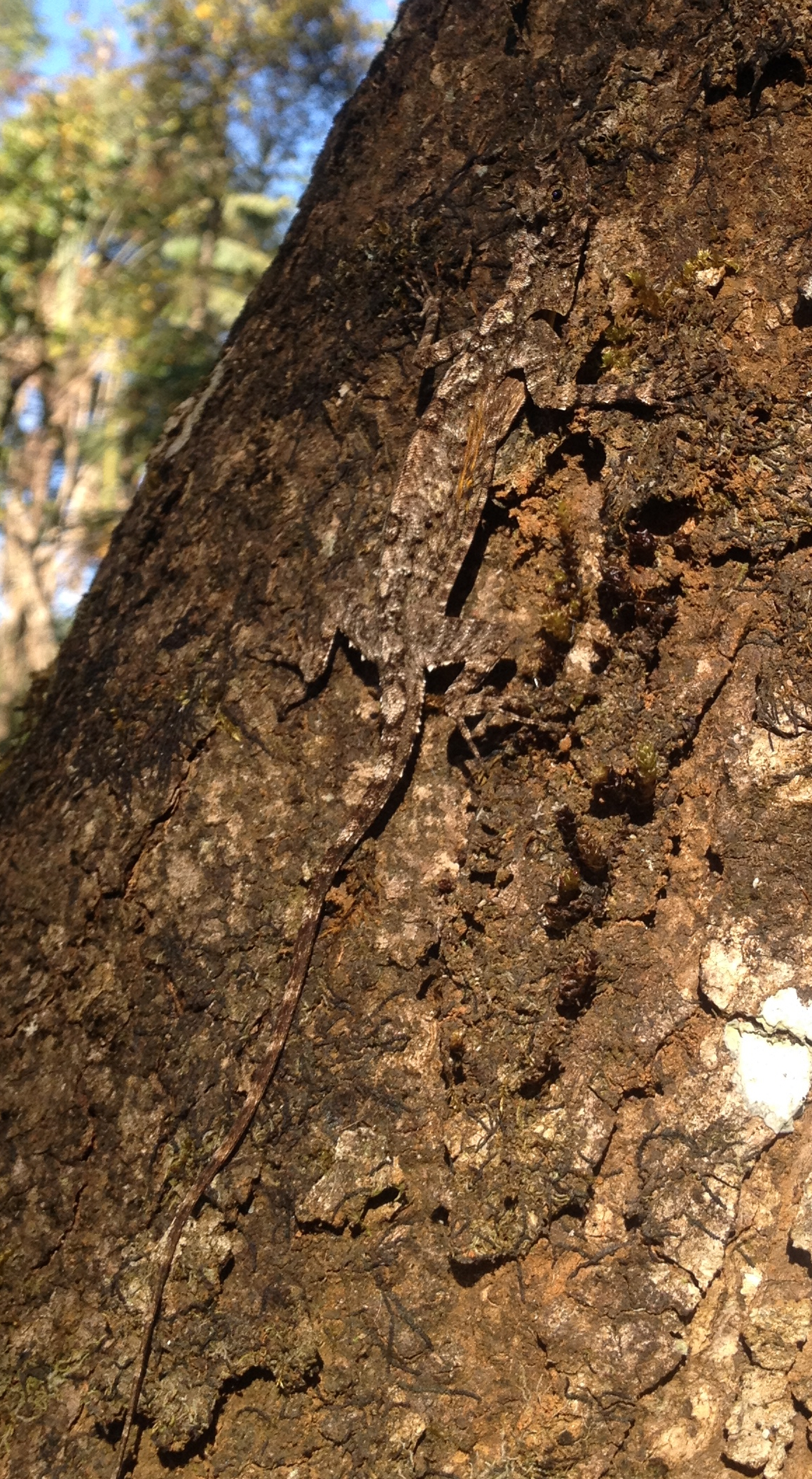 Draco dussumieri, Wynaad